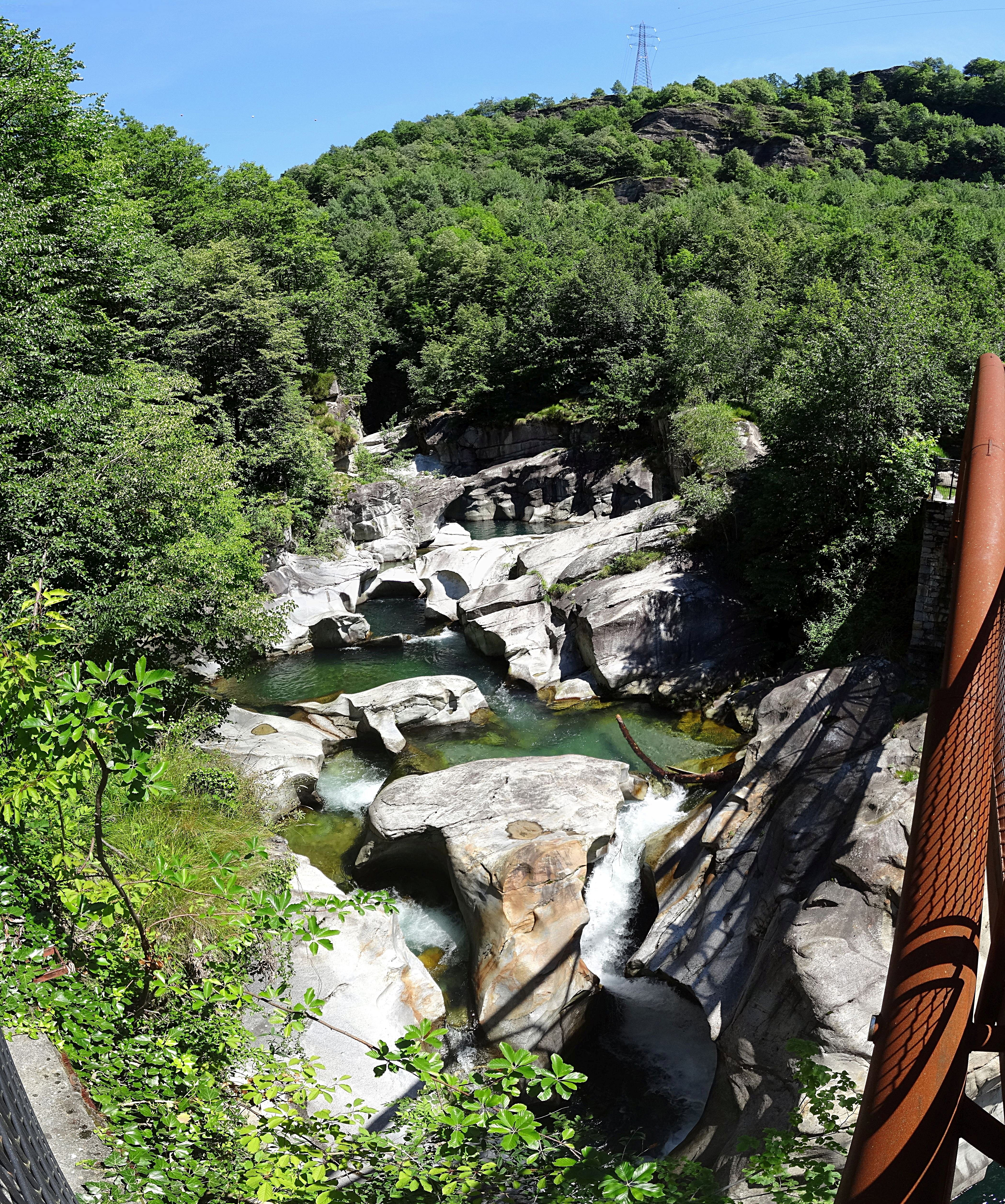 Panorama Marmitte dei Giganti. Hinweis: Es handelt sich nicht, wie der Name suggerieren könnte, um Gletschertöpfe, sondern um Festgesteinskolke im Flussbett.